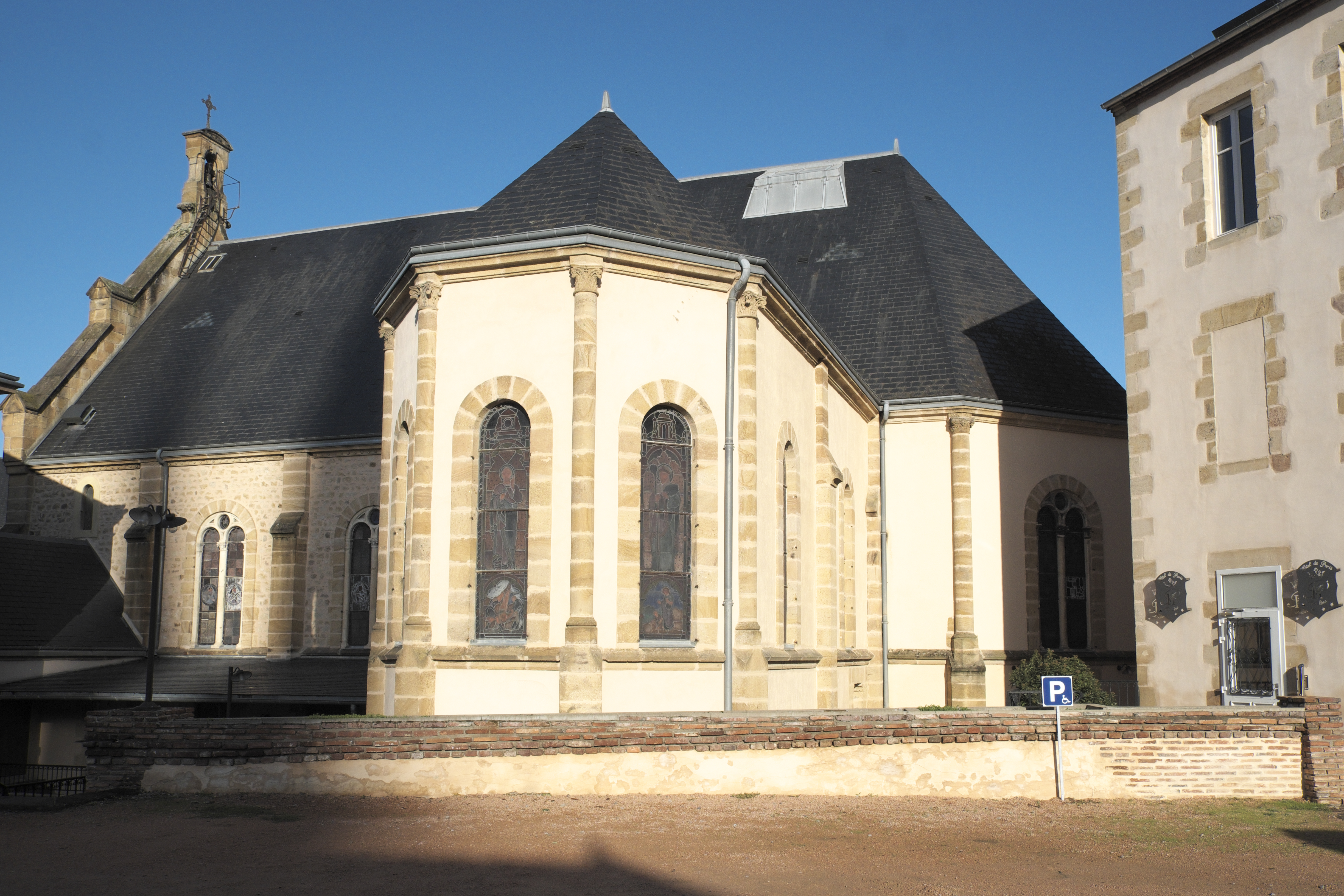 Ehemalige Kapelle Notre-Dame, heute Veranstaltungssaal des Hôtel de Paris, 21 rue de Paris, in Moulins im Département Allier (Auvergne-Rhône-Alpes/Frankreich)